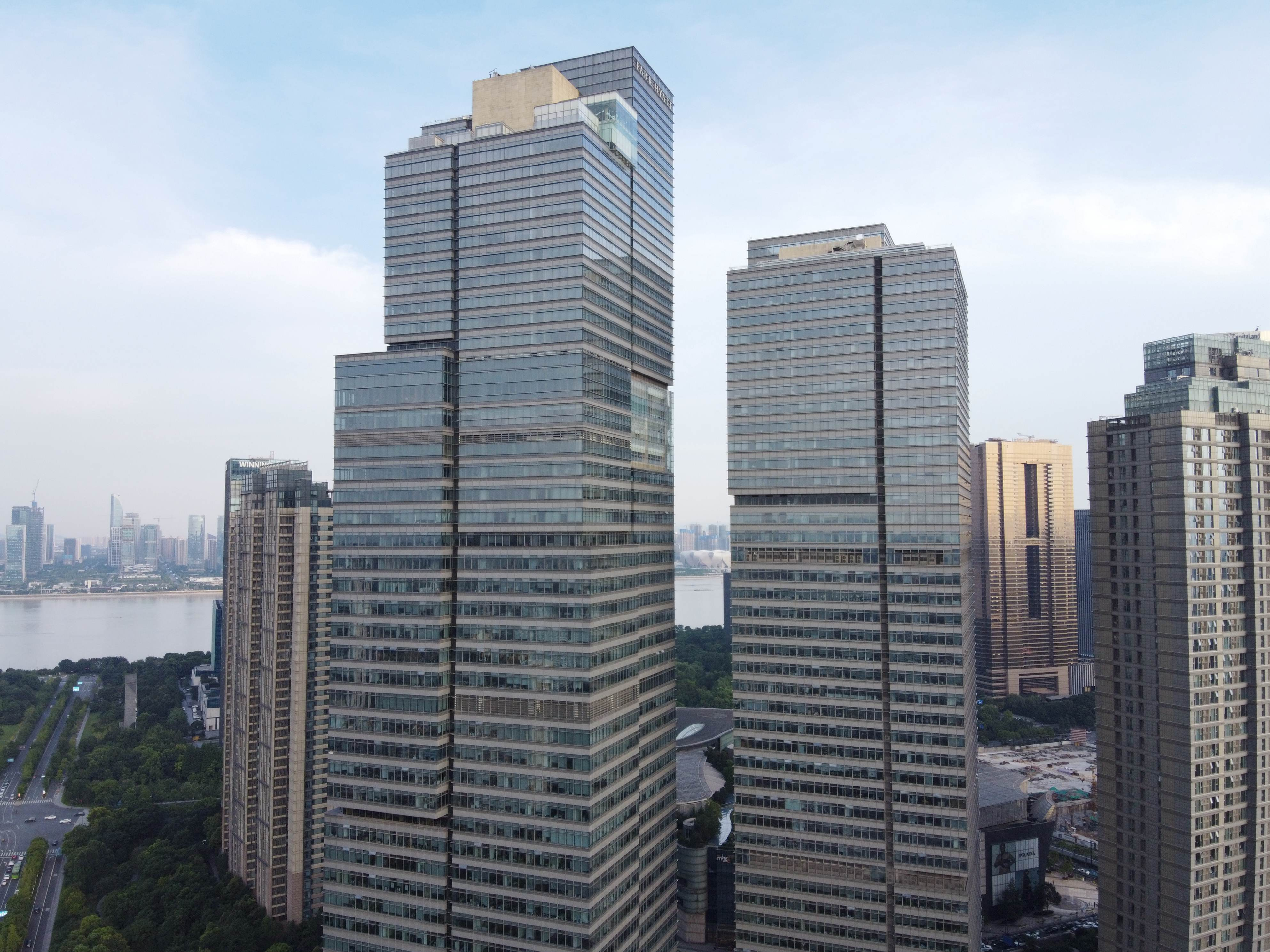 20200712杭州柏悦酒店